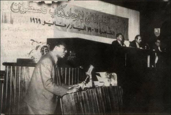 أبو بكر خالد أمام إتحاد كتاب فلسطين